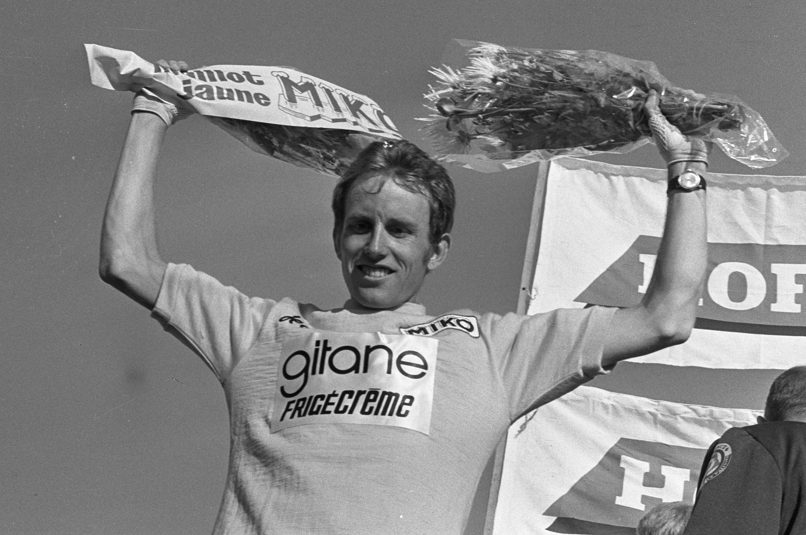 Proloog van Tour de France in Scheveningen, tijdrit, Joop Zoetemelk in gele trui.